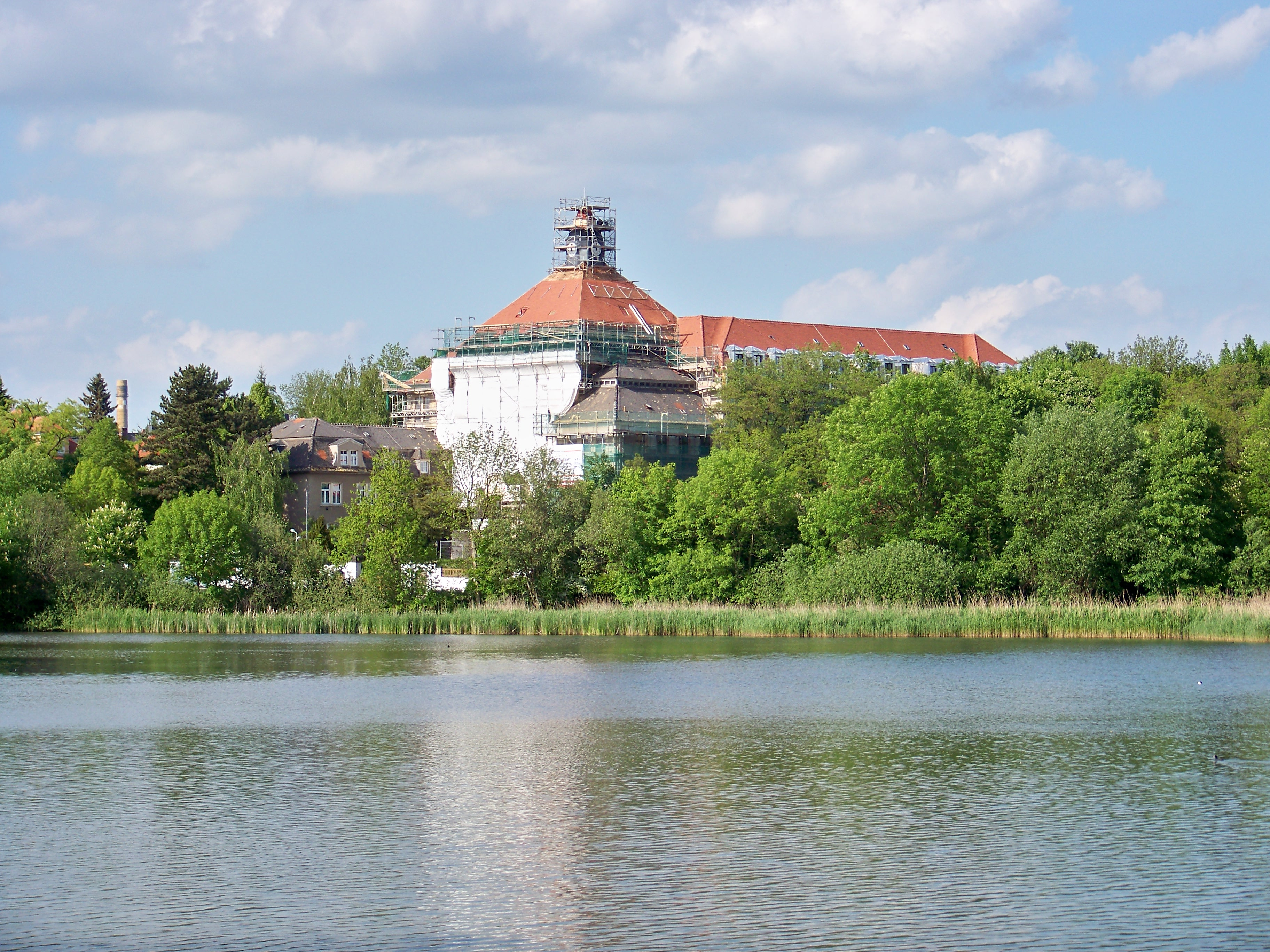 Gymnasium am Breiten Teich in Borna/Sachsen